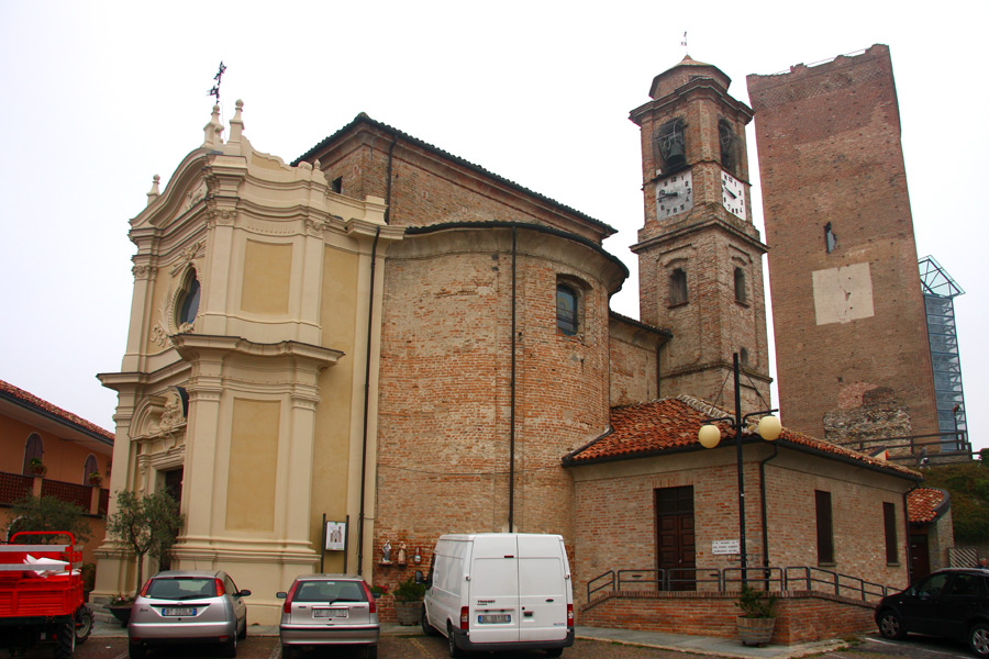 La Chiesa parrocchiale San Giovanni Battista e la torre medioevale di Barbaresco (CN)